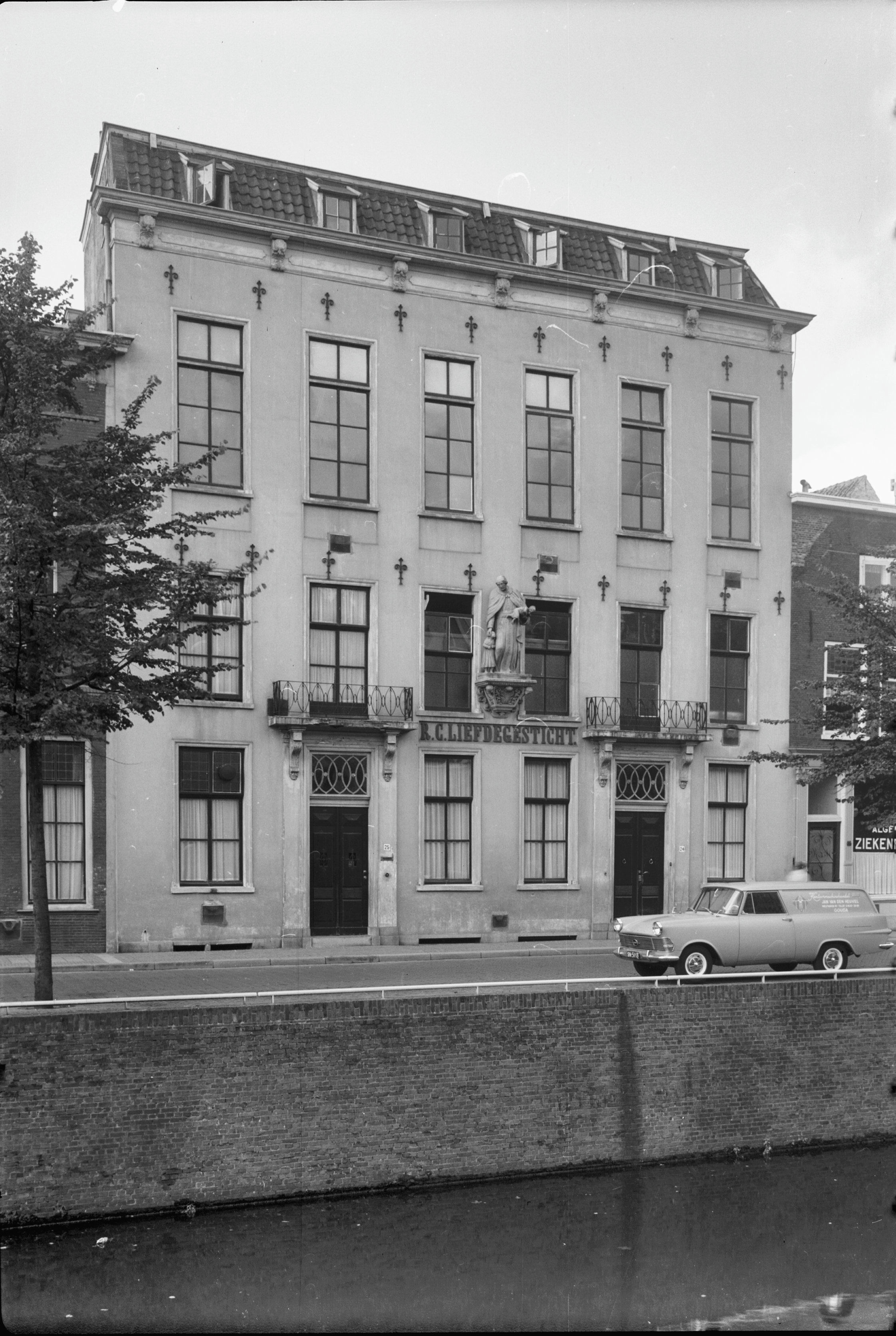 gevels. Het voormalige B.C. Liefdegesticht. Nu het Dubbeld Ancker.